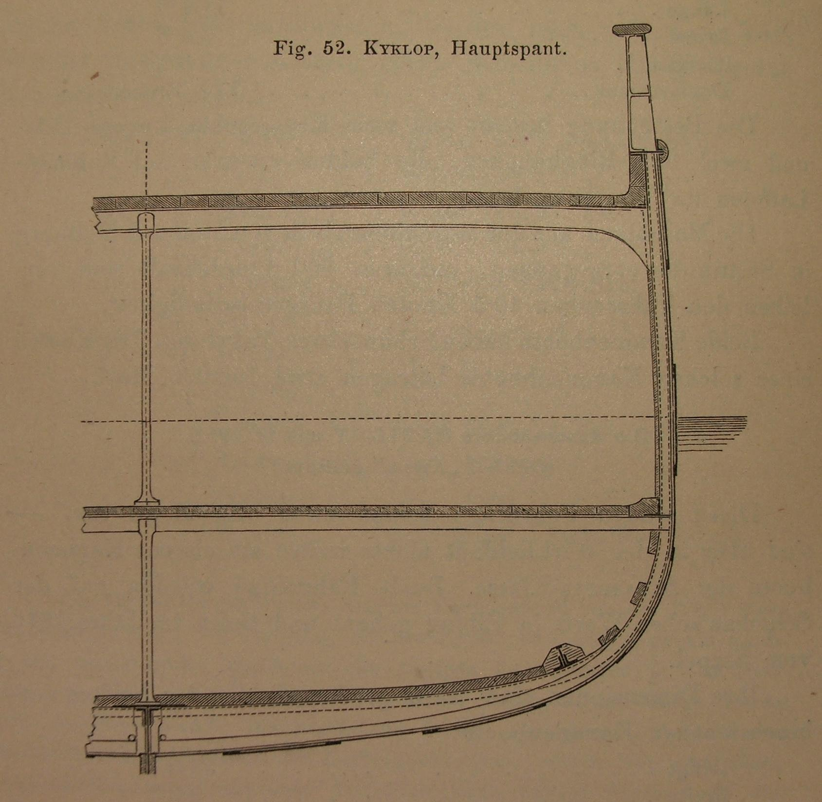 SMS Cyklop/Kyklop aus: von Kronenfels, J. F.: Das schwimmende Flottenmaterial der Seemächte. Eine kurzgefasste Beschreibung der wichtigsten europäischen, amerikanischen und asiatischen Kriegsschiffe der neueren und neuesten Zeit. A. Hartleben's Verlag, Wien. Pest. Leipzig 1881.